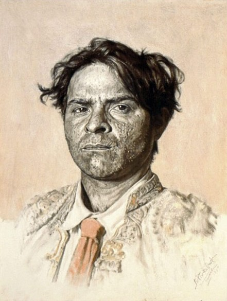 Torero Gitano Tambien llamado"El que nunca llegó" Carboncillo y toques de pastel. 58 x 61 cm 1969 colección privada